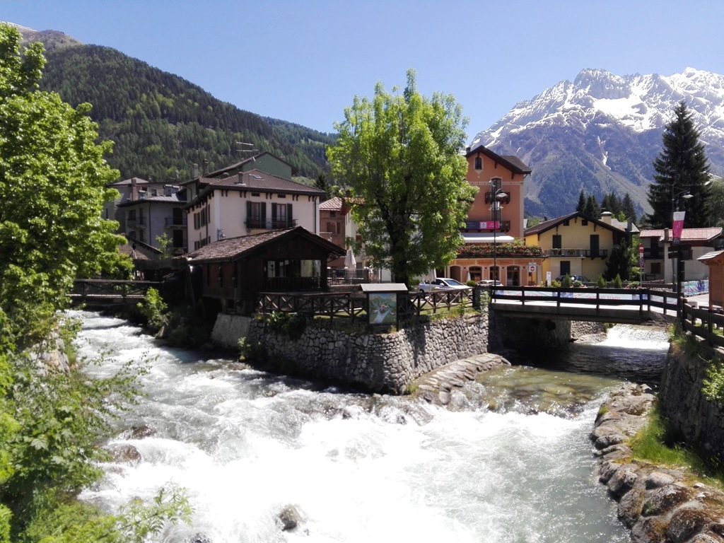 Oglio, Frigidolfo e Narcanello - Ponte di Legno